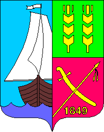 Герб Новоазовска